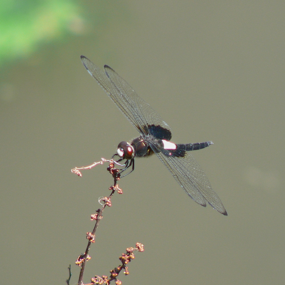 打上川治水緑地（大阪府）のコシアキトンボ。